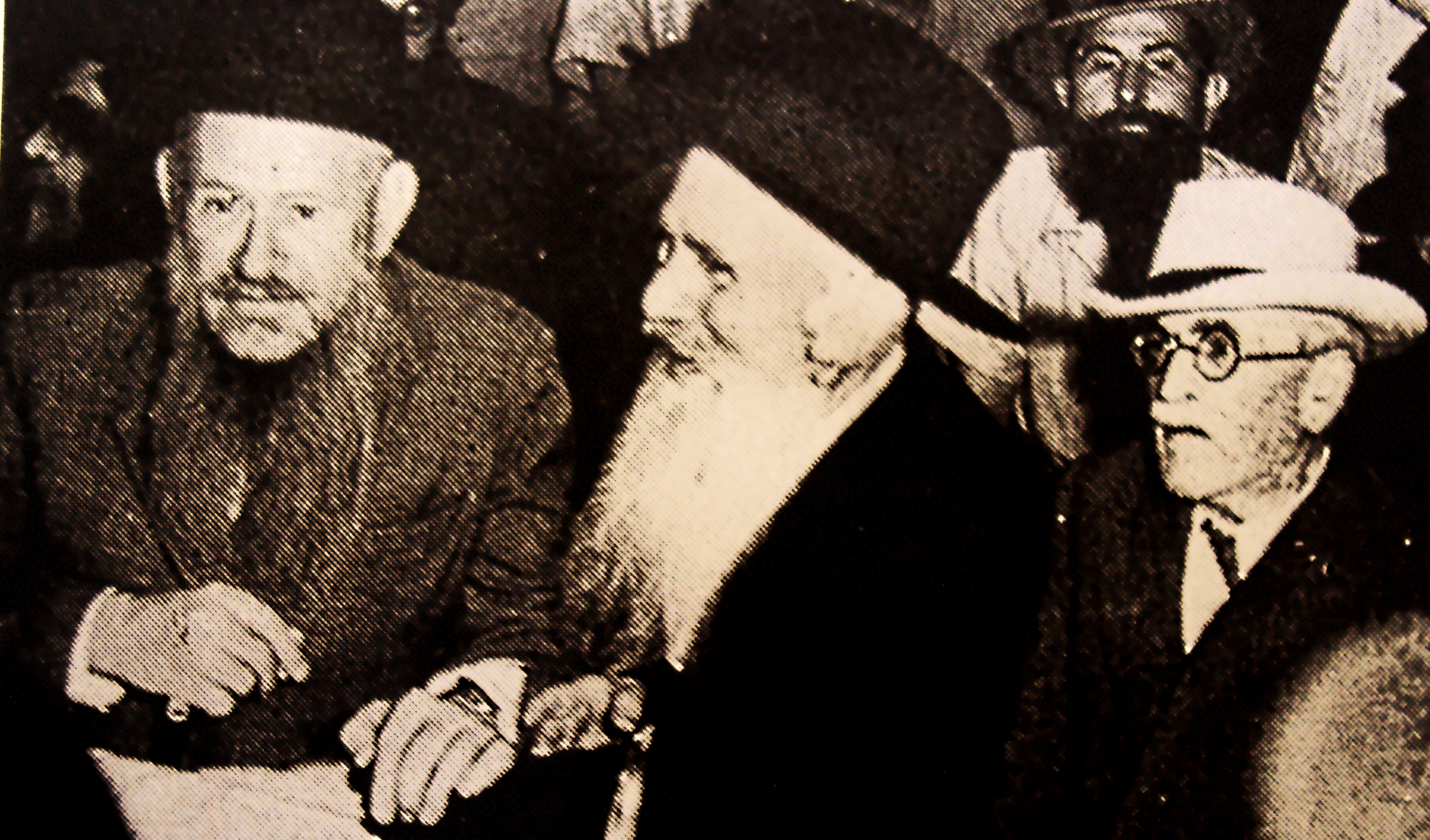 מרדכי הליגמן, הרב יוסף צבי קאליש, יצחק גרשטנקורן